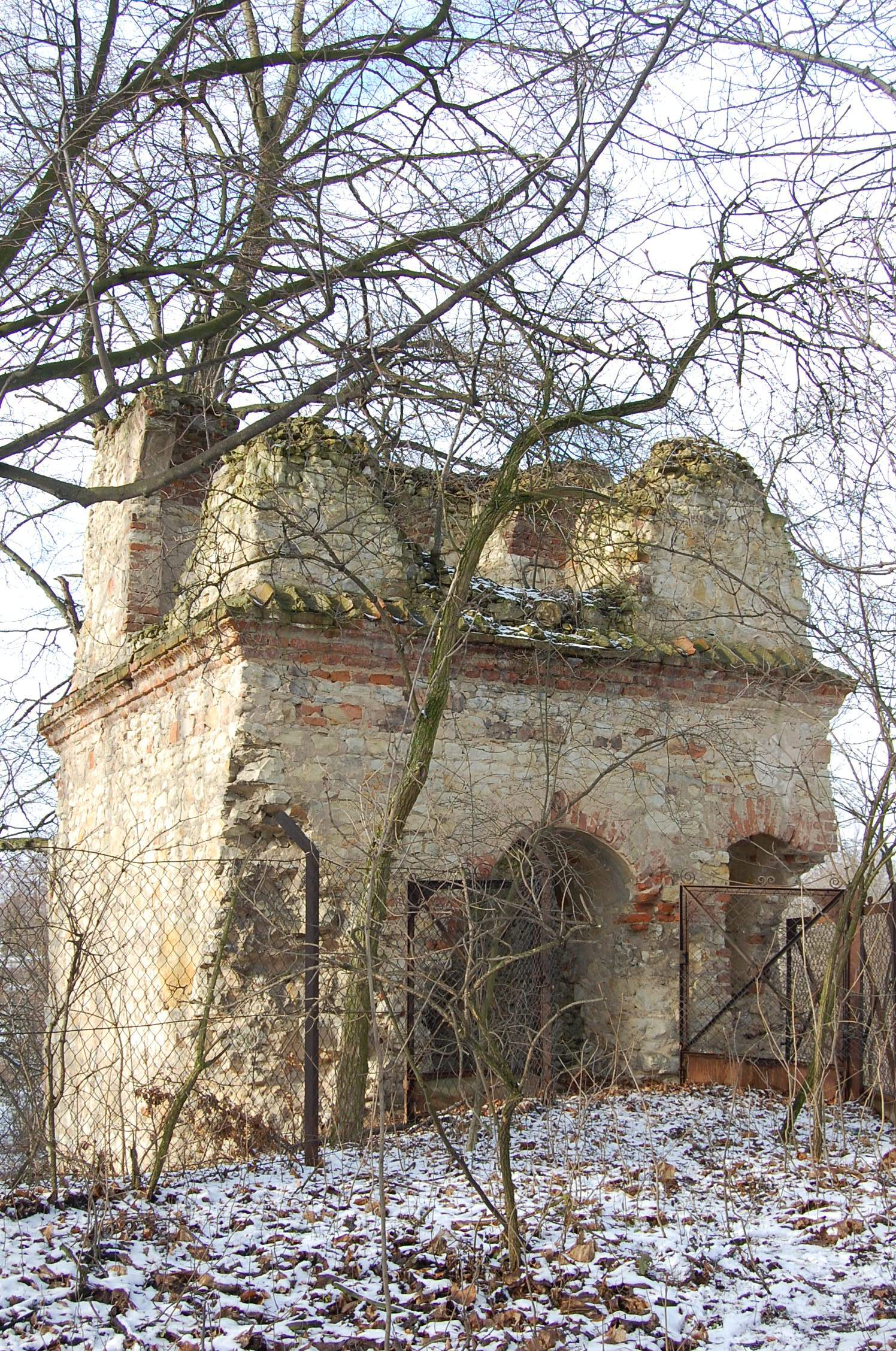 Dzwonnica z połowy XVII wieku w Konopnicy